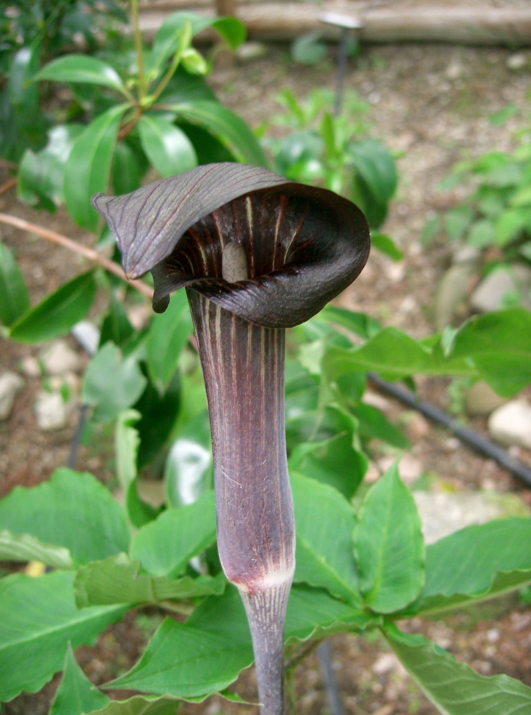 Scientific name Arisaema serratum var. mayebarae